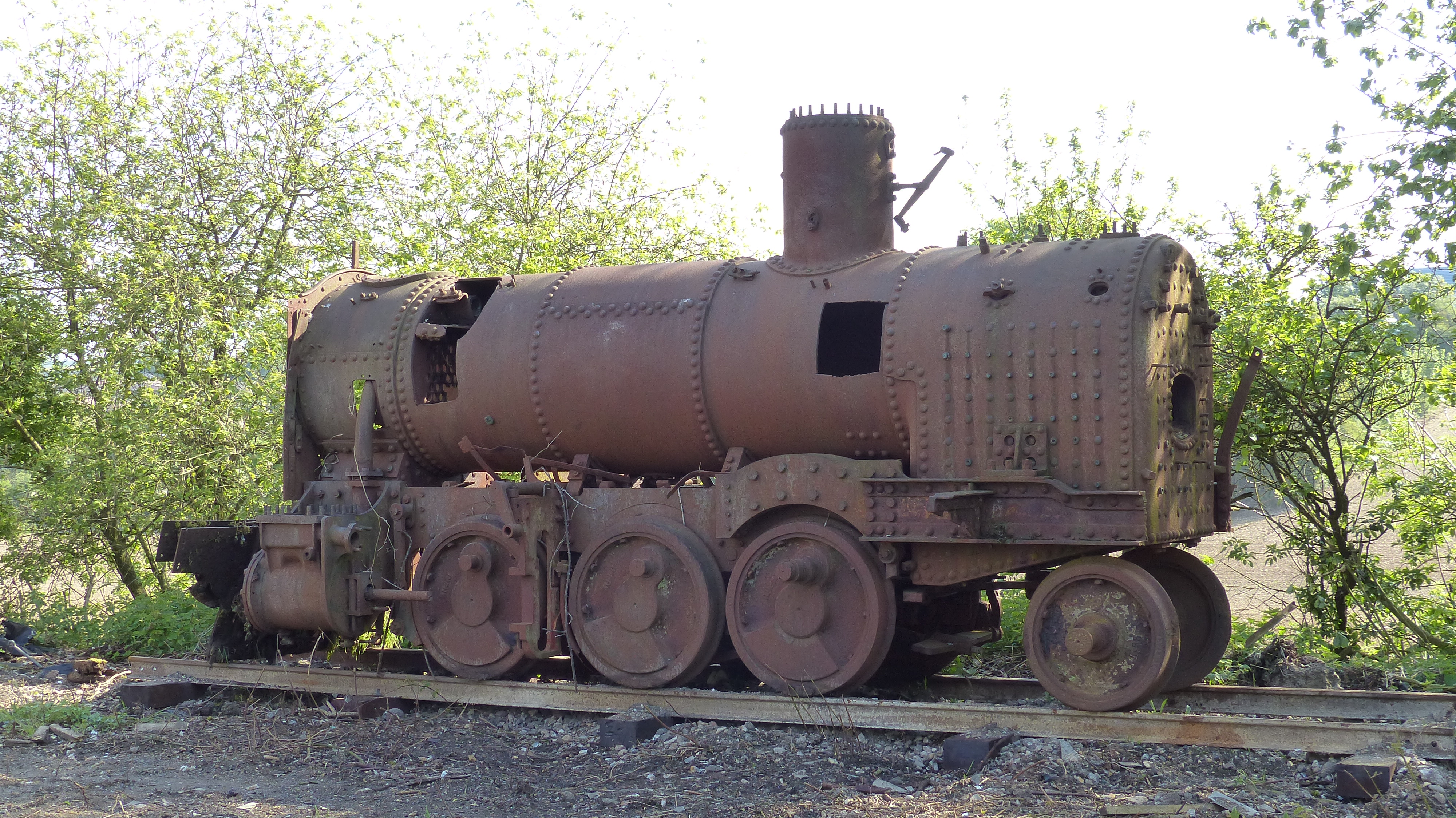 La première pièce de la collection du MTVS transférée à Crèvecœur-le-Grand : vestiges d'une 031T Schneider de 1898, arrivée à Crèvecœur le 25 avril 2014.Il s'agit de la locomotive n°12 Ex-Chemins de fer départementaux de la Côte-d'Or récupérée chez le ferrailleur Vaillant à Saint-Valery-sur-Somme